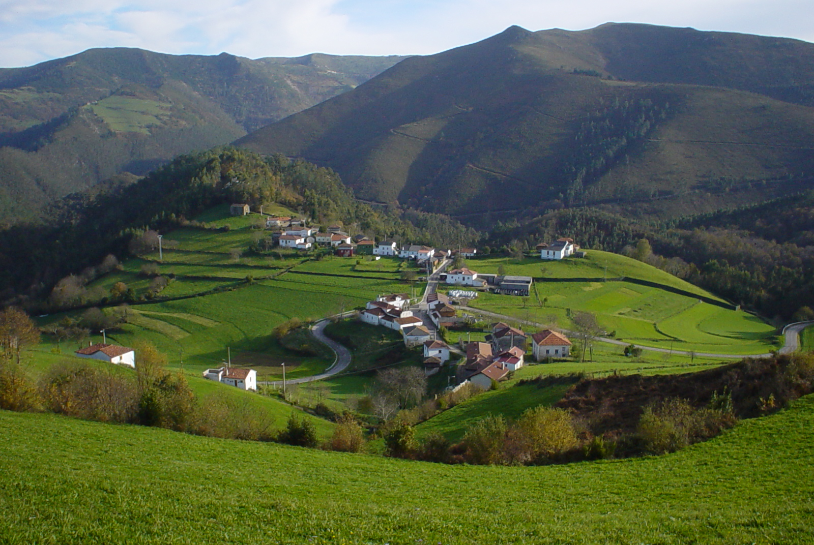 Vista de Arcallana, pueblo que da nombre a la parroquia.